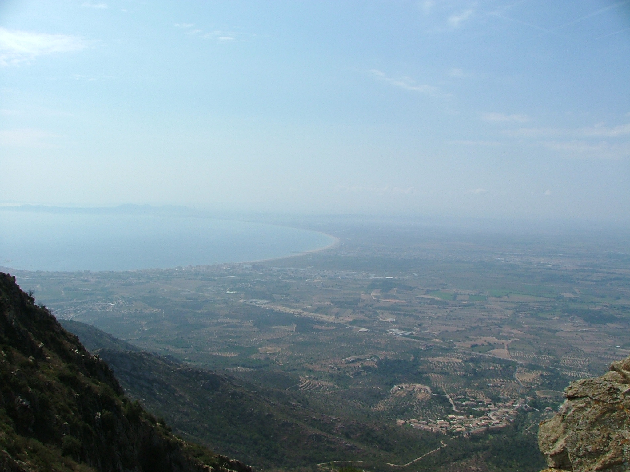 View of Costa Brava from Monestir San Pere Rodes, Empordà, Costa Brava, Catalunya, Spain